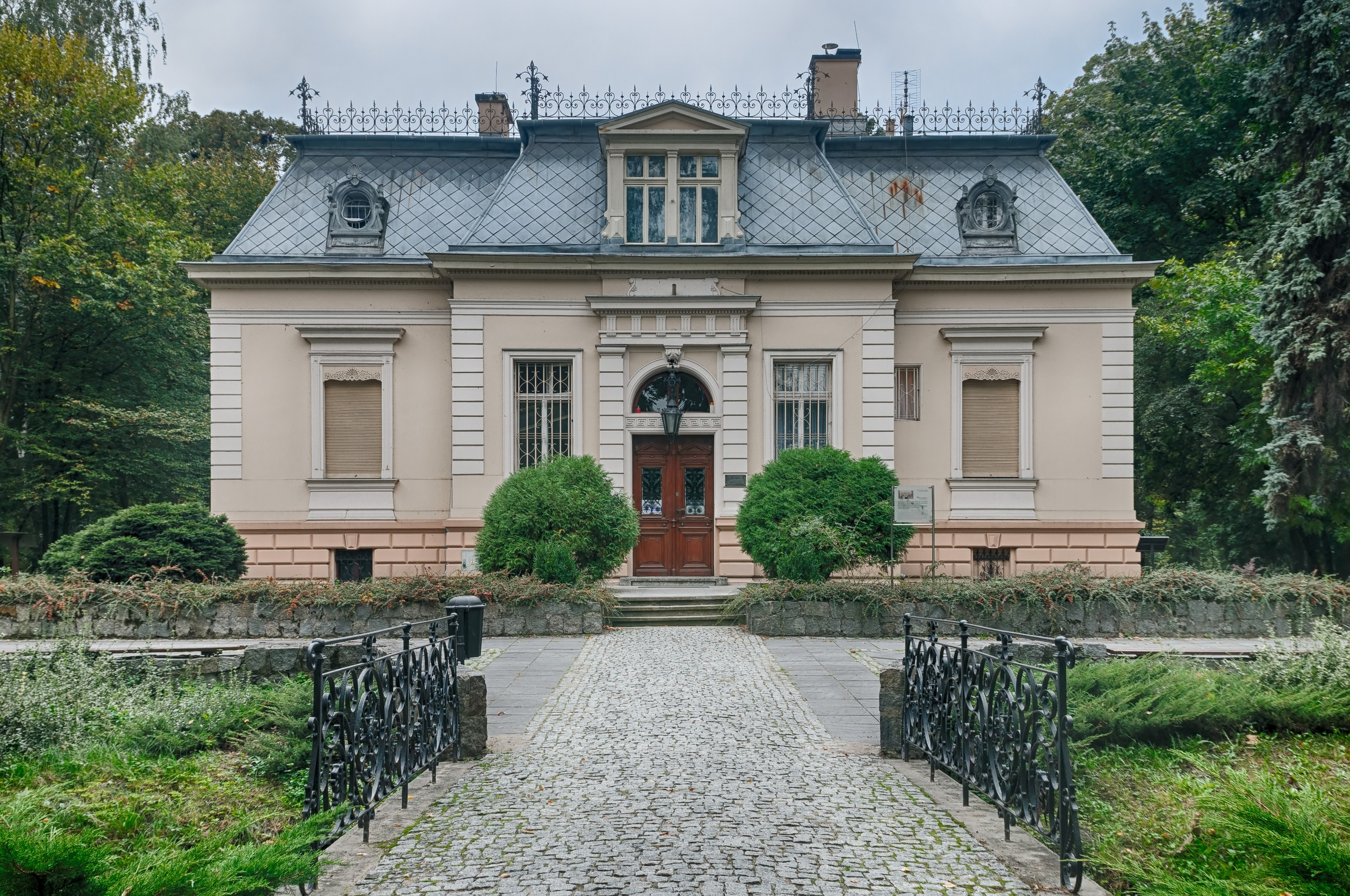 Żyrardów, zespół pałacowy Dittricha, ul. Dittricha 1 pałacyk, ob. muzeum (zabytek nr 727 z 7.05.1962)